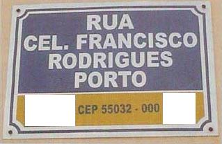 Rua